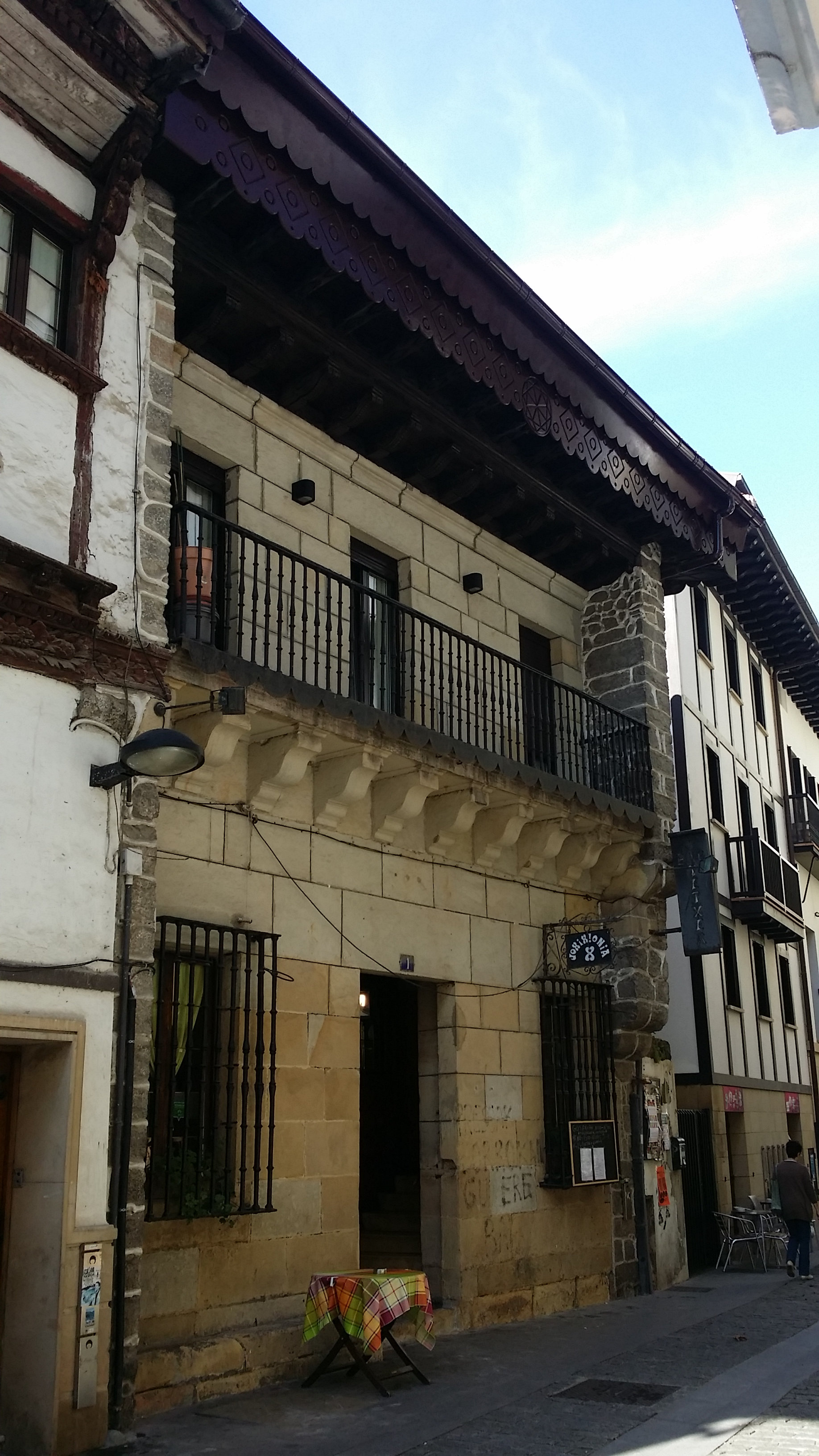 Kale nagusiko hegaldun etxeak, Oiartzun.